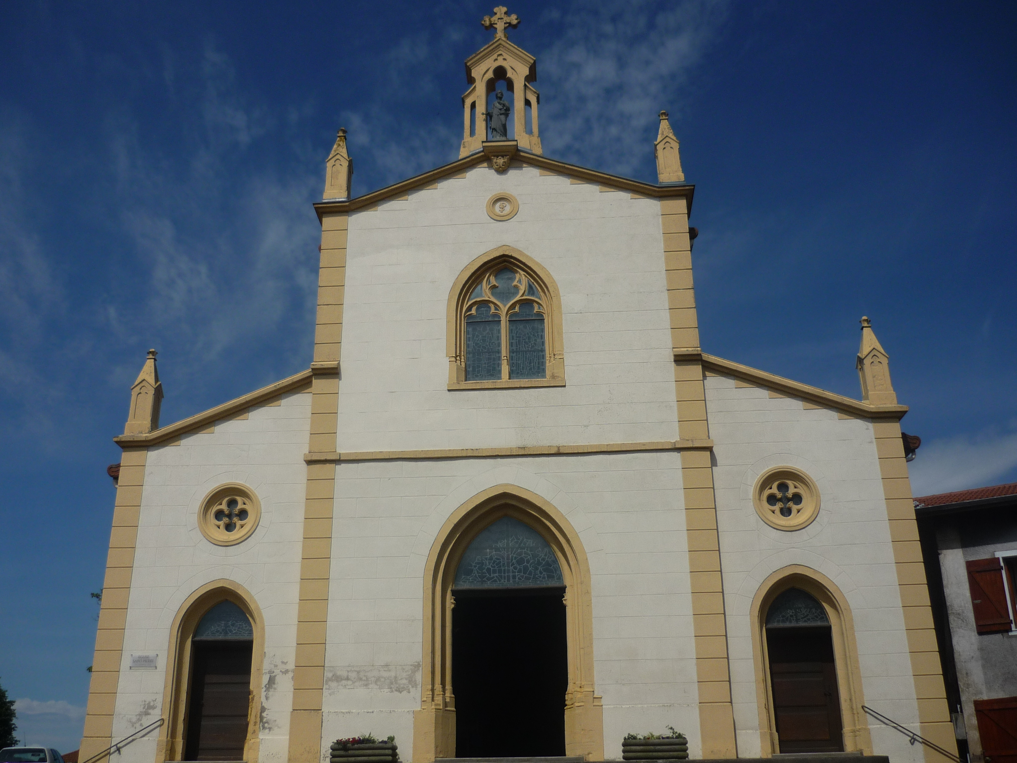 Église du village des Sauvages, dans le département du Rhône en France.